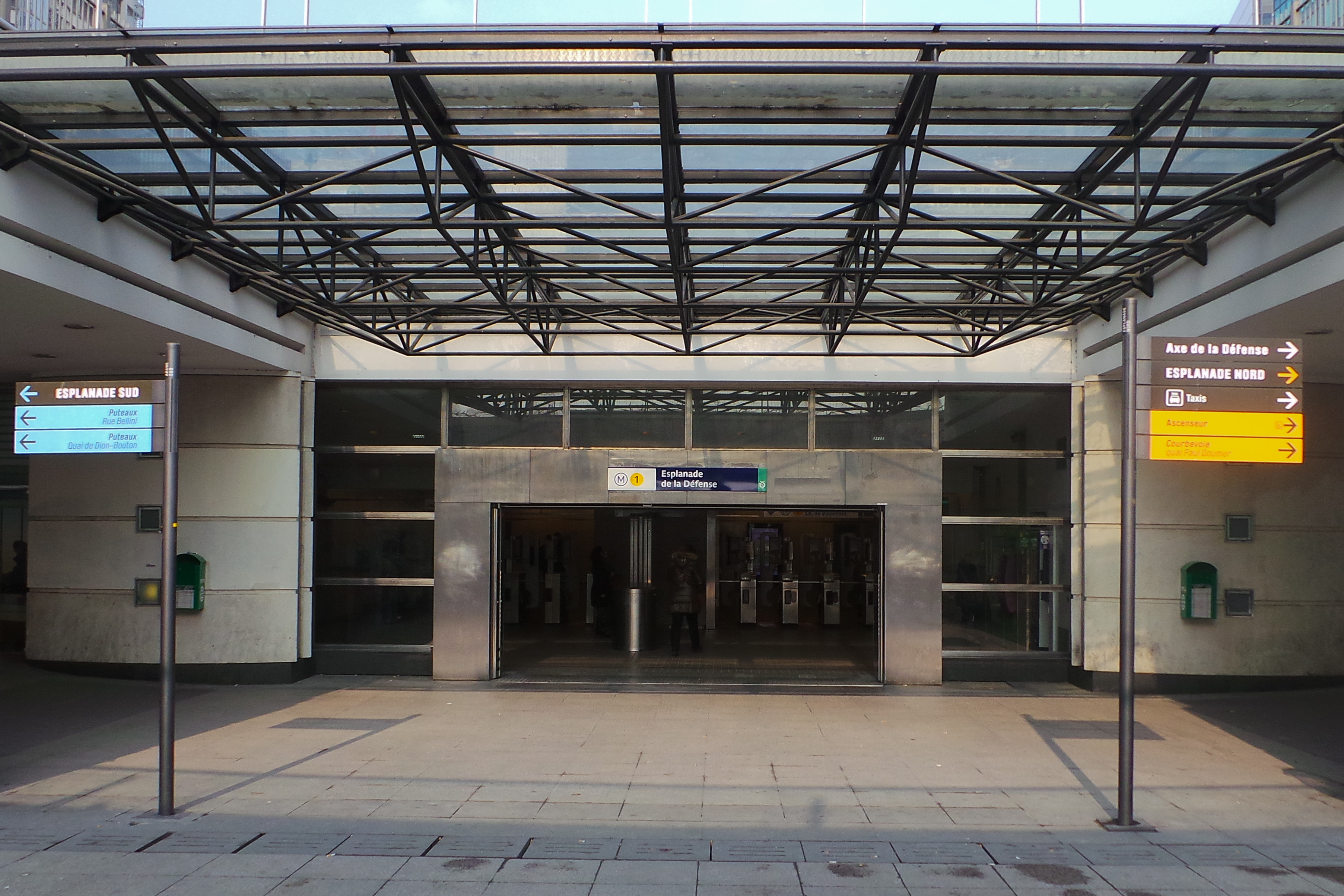 Station Esplanade de la Défense, Ligne 1 métro de Paris. (Accès est de la station)